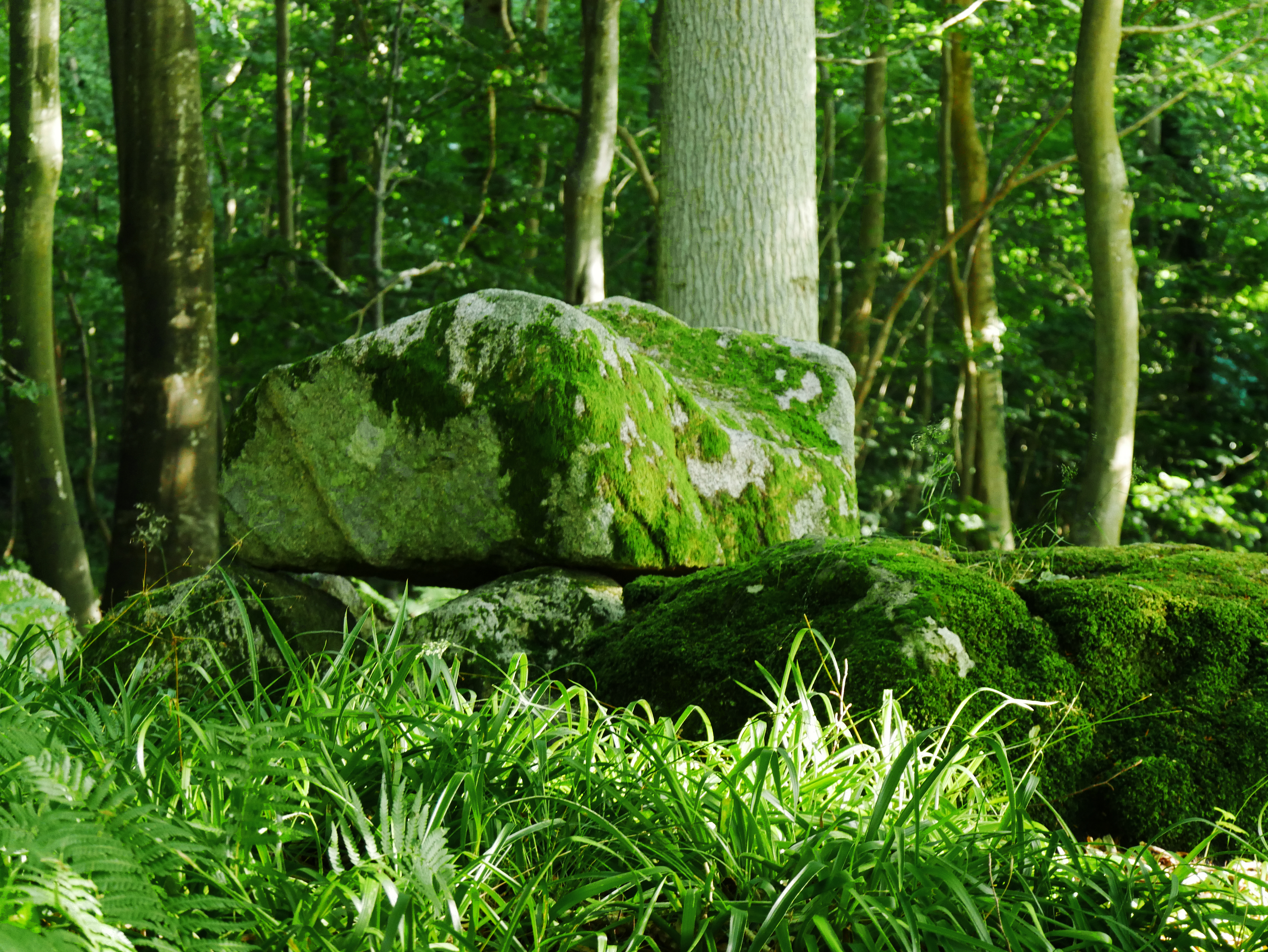 Der Langdysse von Sønder Stenderup (auch Midtskov Afdl. 82 genannt) liegt im Midtskov (mittlerer Wald), östlich von Kolding in Jütland in Dänemark. Er stammt aus der Jungsteinzeit etwa 3500 bis 2800 v. Chr. und ist eine Megalithanlage der Trichterbecherkultur (TBK). Das etwa einen Meter hohe Nordwest-Südost orientierte Hünenbett des Langdysse mit zwei querliegenden, 1942 restaurierten Dolmenkammern ist etwa 21,0 m lang und 9,0 m breit. Die Randsteine (38) sind nahezu vollständig erhalten. Die Kammern haben beide die gleiche Form. Ein Endstein im Norden, zwei seitliche Tragsteine im Osten und Westen, zwei Gangsteinpaare (ohne Decksteine) und ein Deckstein auf der Kammer.